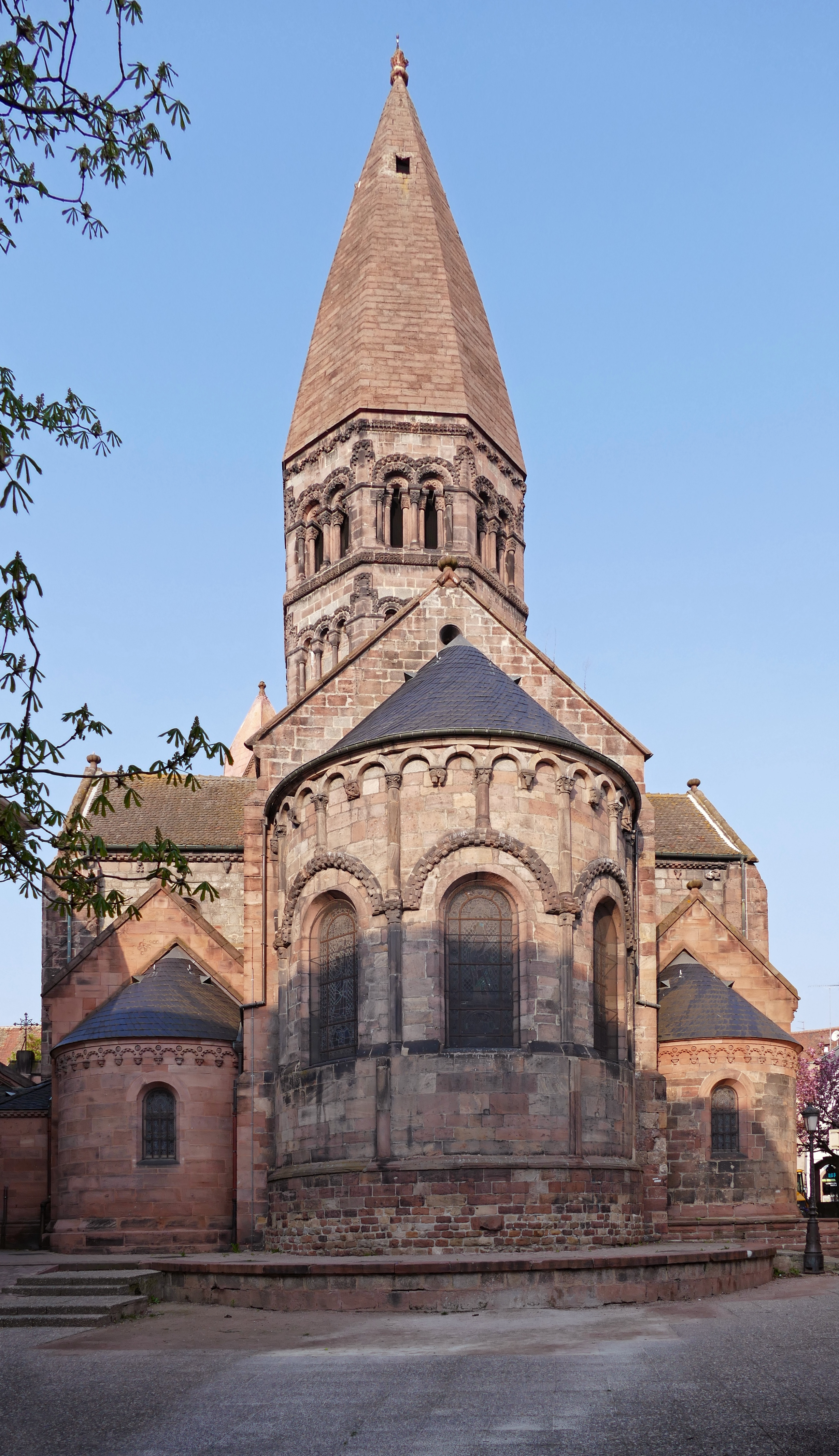 Alsace, Bas-Rhin, Église Sainte-Foy de Sélestat (PA00084981, IA00124586): Chevet roman.